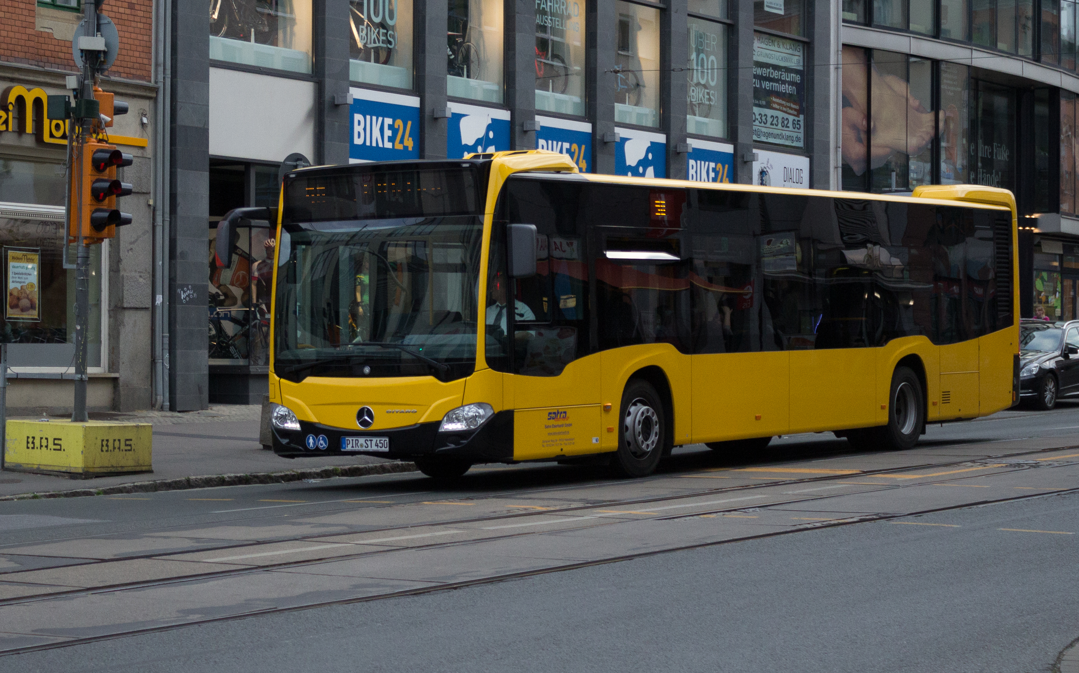 Mercedes-Benz Citaro-Bus Dresden